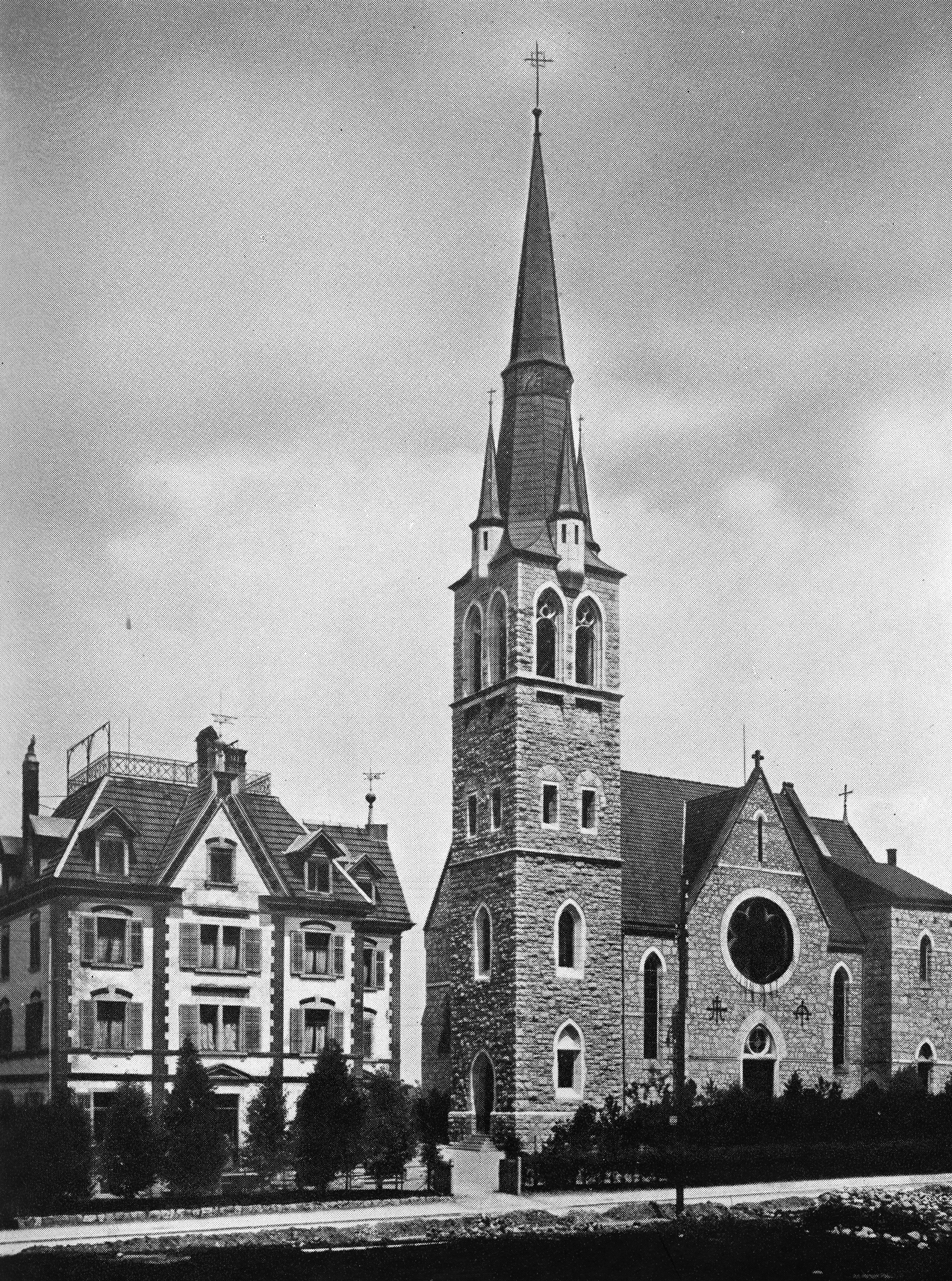 Römisch-katholische Pfarrkirche Herz Jesu Zürich-Oerlikon, historische Aufnahme von 1943